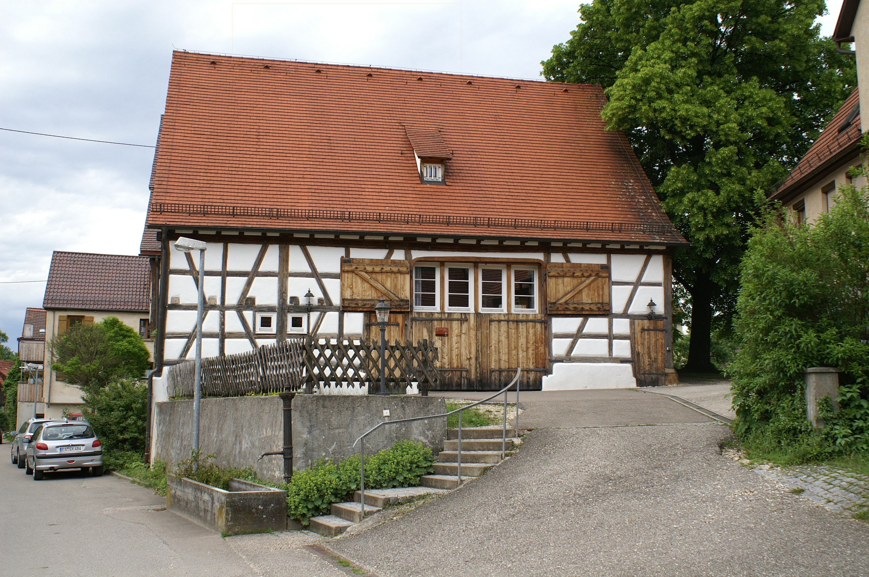 In der historischen Pfarrscheuer in Neidlingen befindet sich heute ein Gemeindehaus